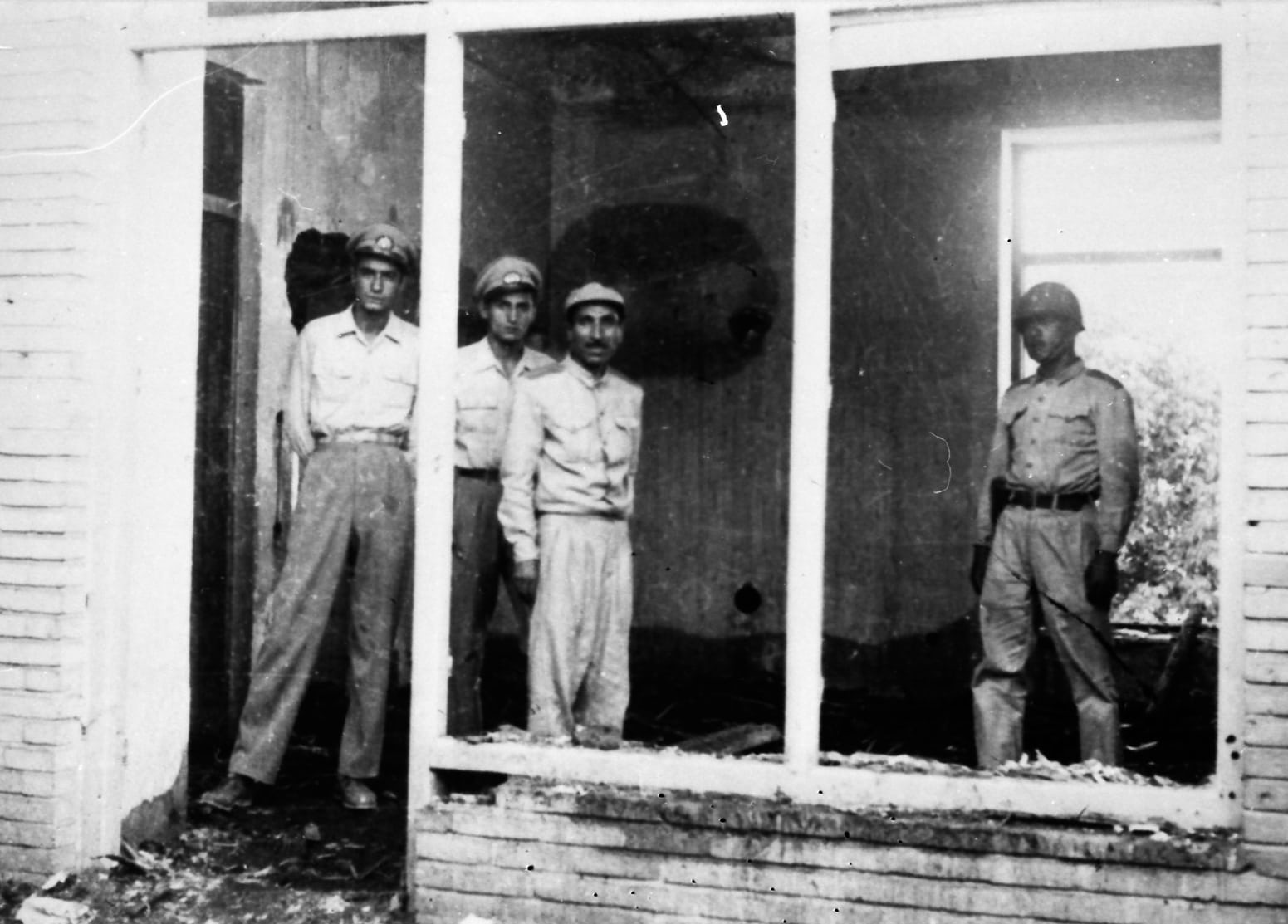 28 مرداد 1332، 7:30 بعد از ظهر: پس از 5 ساعت مقاومت، خانه مصدق به اشغال نظامیان درامد. در این نگاره، سرای اصلی خانه مصدق دیده می شود که پیش از آن، محل دیدار مصدق با مقامات خارجی بوده است. تمام اموال این خانه و حتی پنجره های آن نیز غارت شده و باقی آنها سوختند.